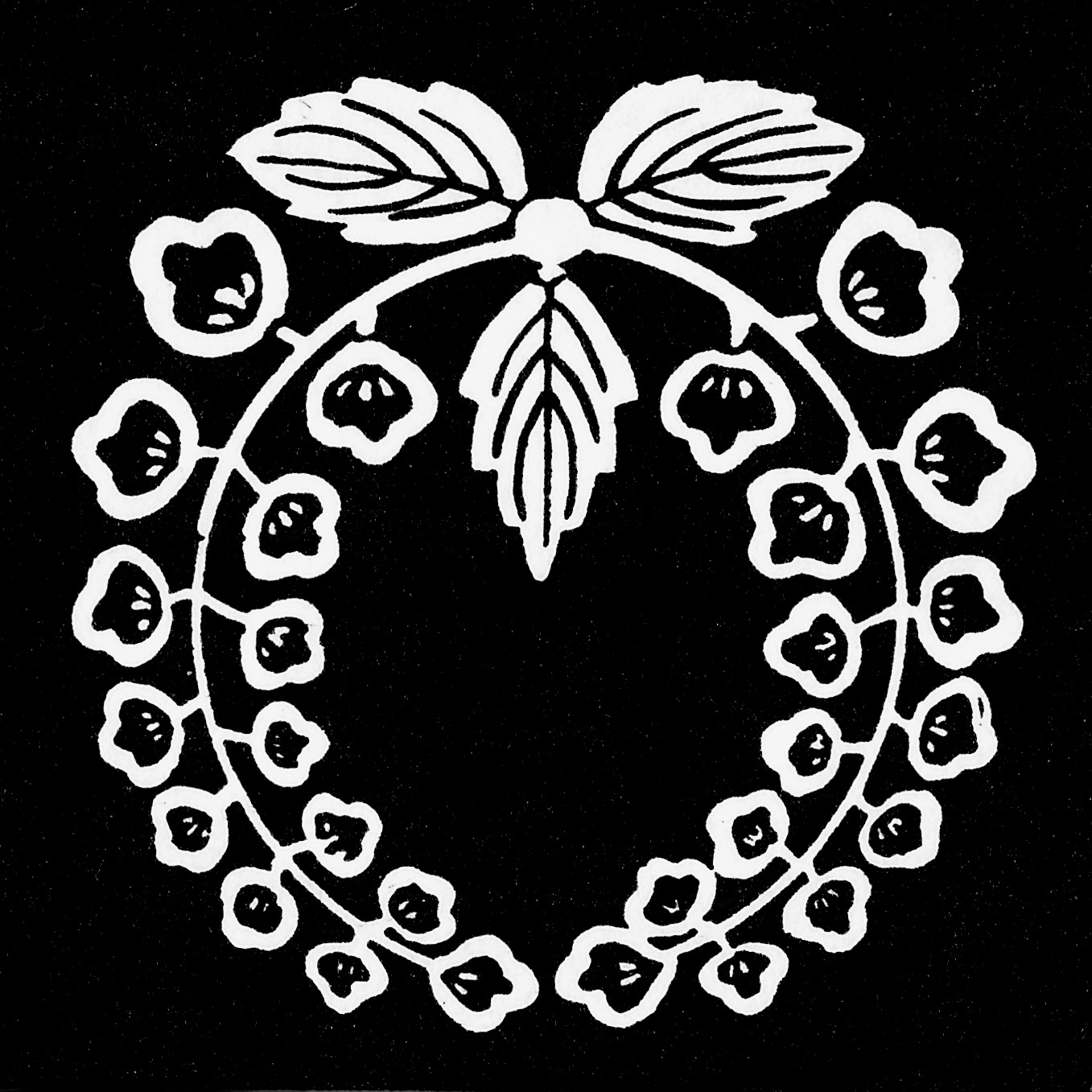 岩船藤